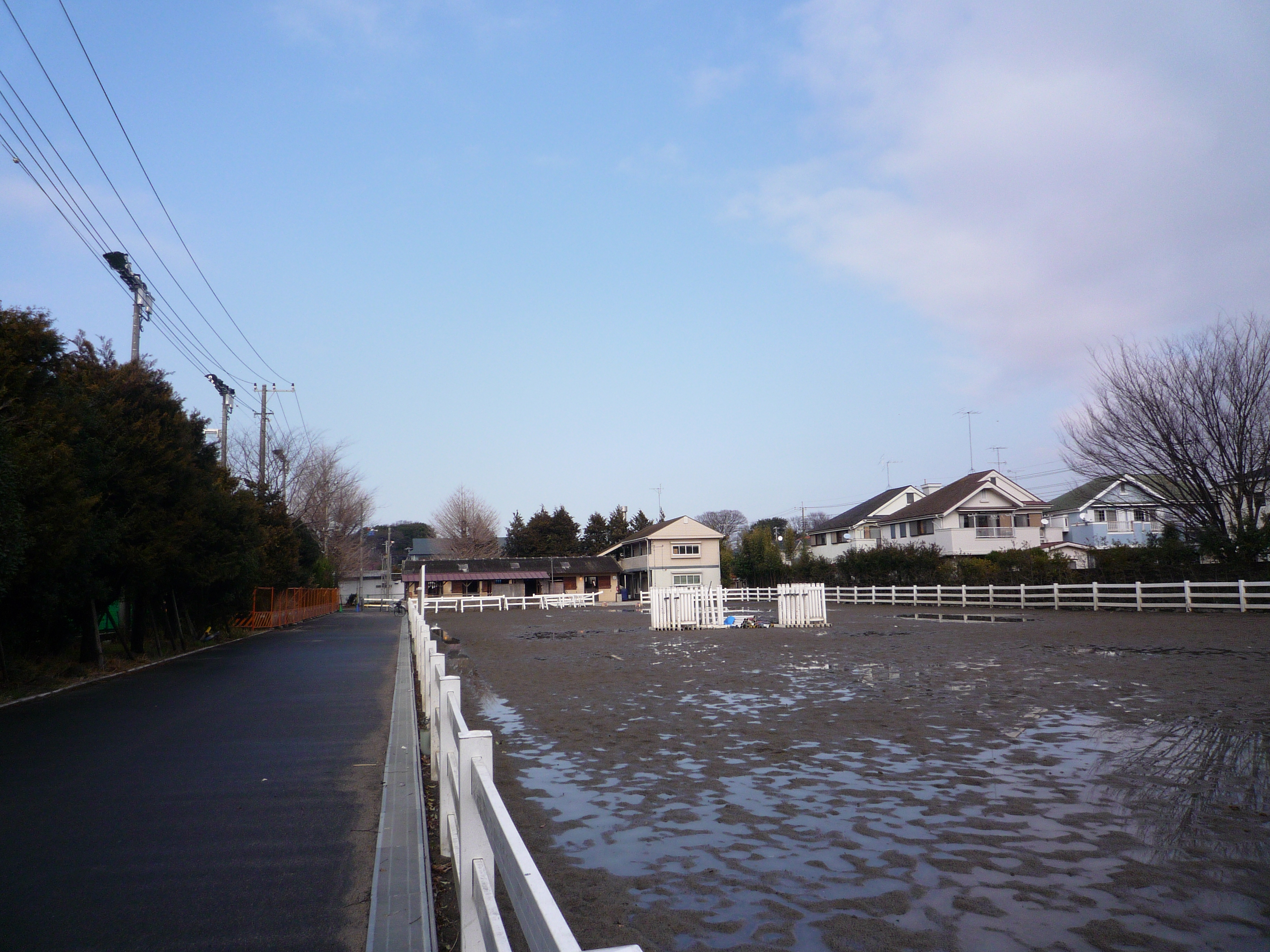 成蹊大学 馬術場